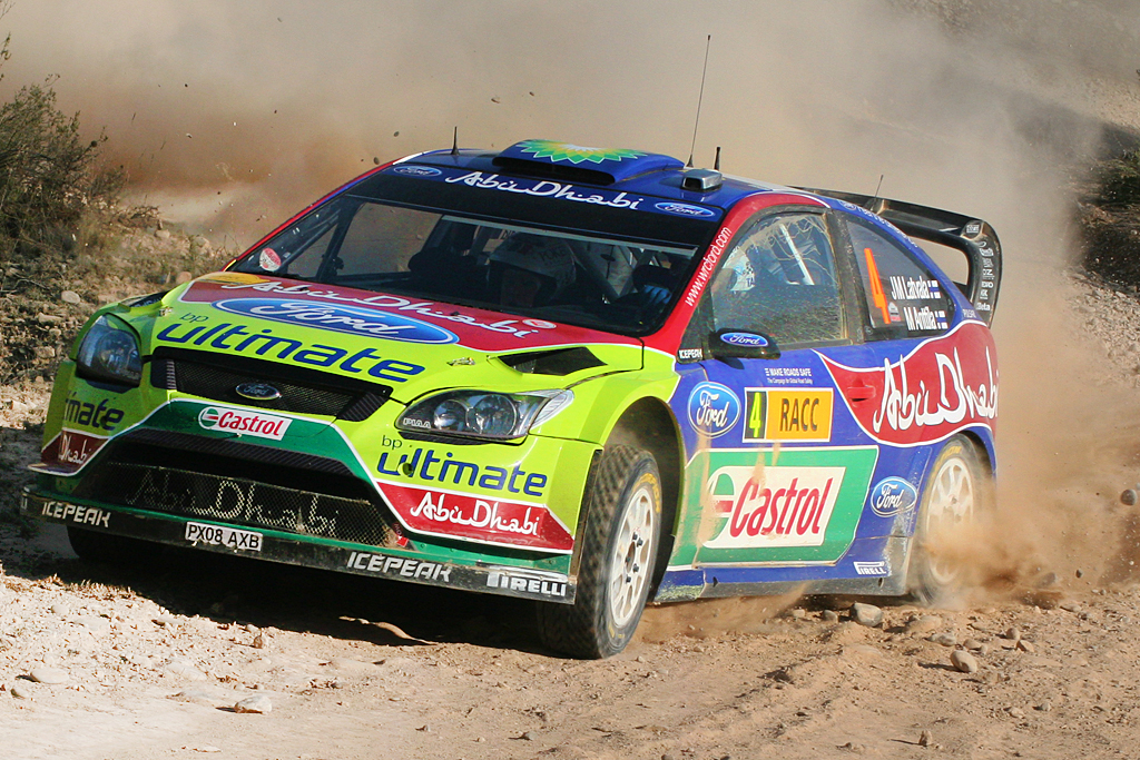 Jari-Matti Latvala in Rally Cataluña 2010